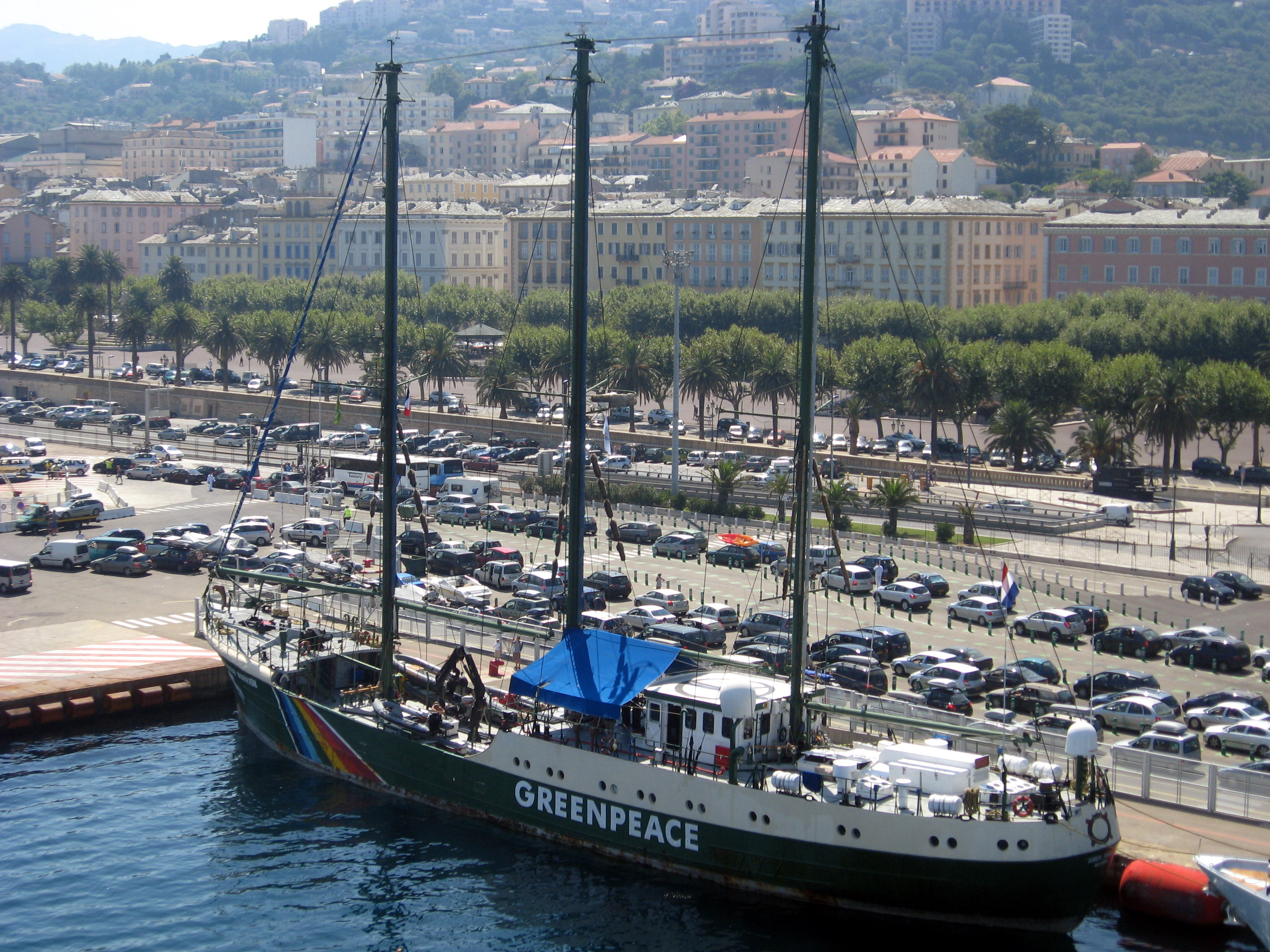 Rainbow Warrior im Hafen von Bastia, Korsika, Frankreich